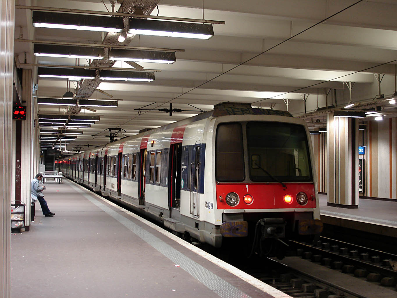 Automotrice Z 8100 (MI 79) à la gare de Paris-Nord, France.